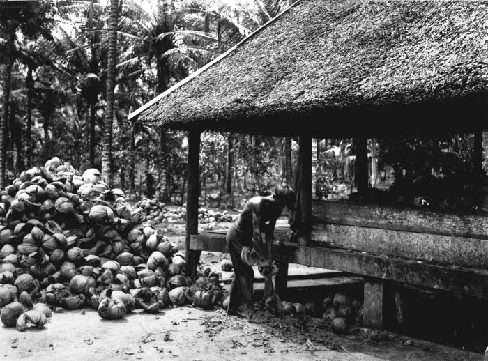 Foto. De overjarige cultures ter oostkust van Sumatra in woord en beeld. Door de A.V.R.O.S. eerbiedig opgedragen aan Z.E. den Gouverneur-Generaal van Nederlandsch-Indië Mr. D. Fock. Het ontbolsteren van de klapper op de onderneming Sungei Rampah